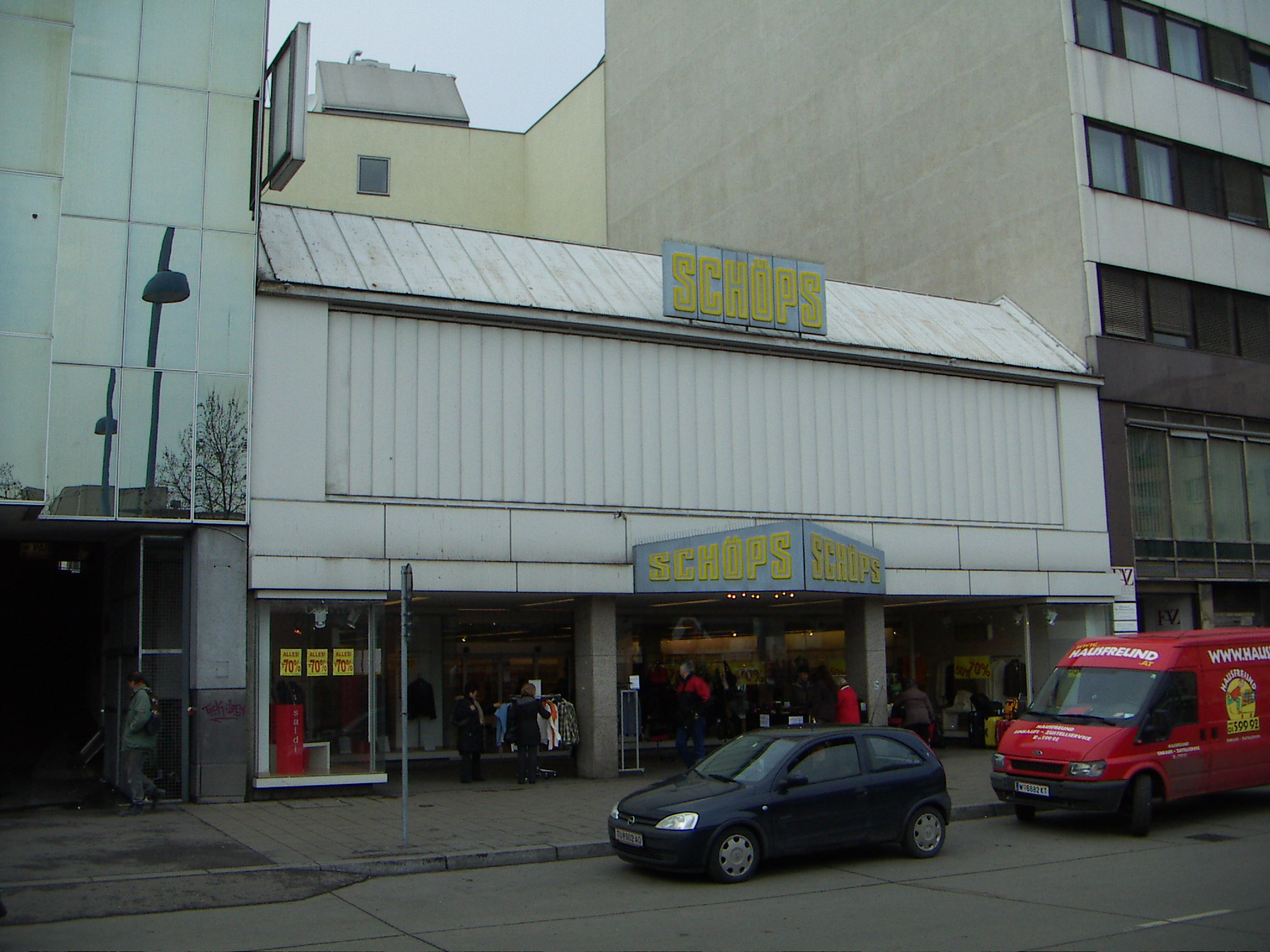 Schöps-Filiale in Floridsdorf, Franz-Jonas-Platz.